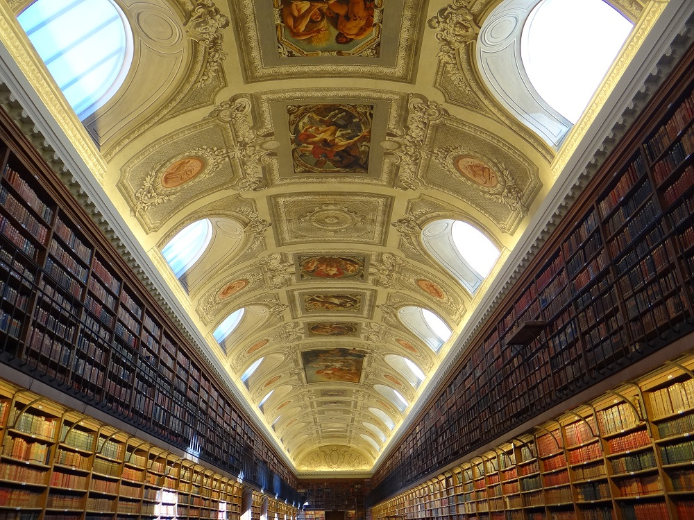 Palais du Luxembourg .